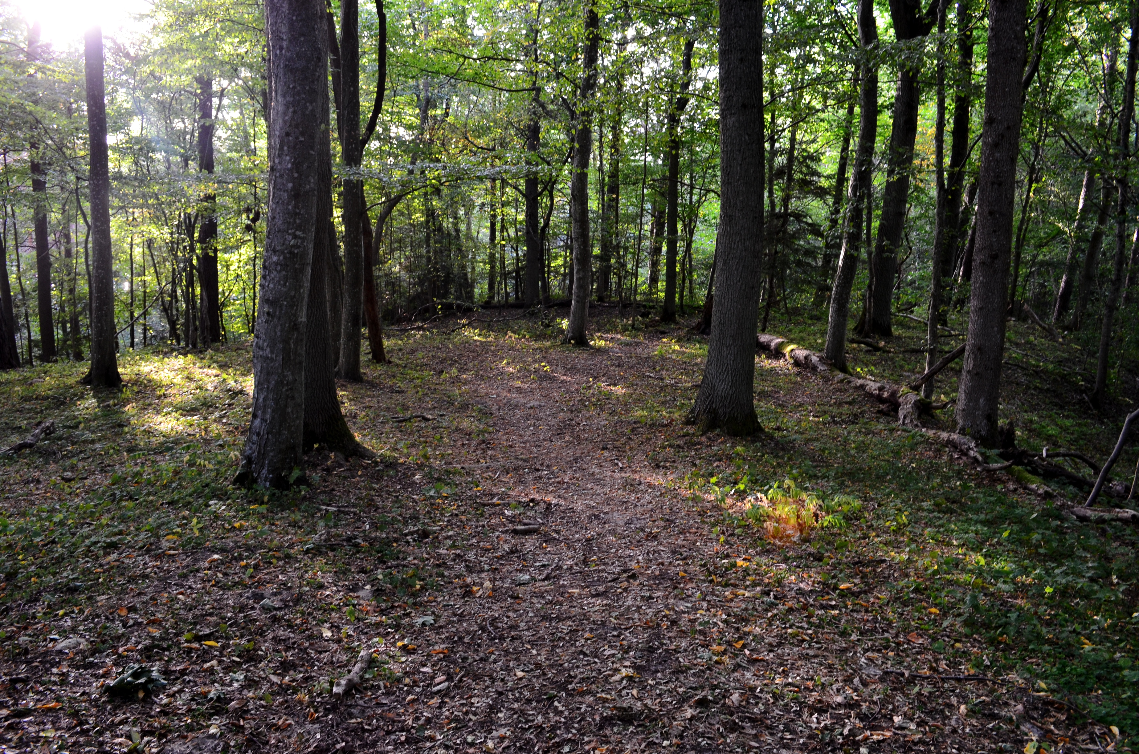 Kukuliškių piliakalnis, Klaipėdos raj.